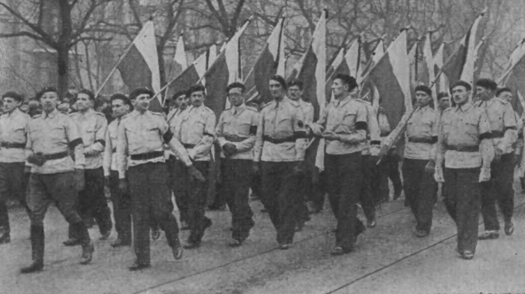 Członkowie Stronnictwa Narodowego podczas pogrzebu Romana Dmowskiego. Warszawa 1939 r.